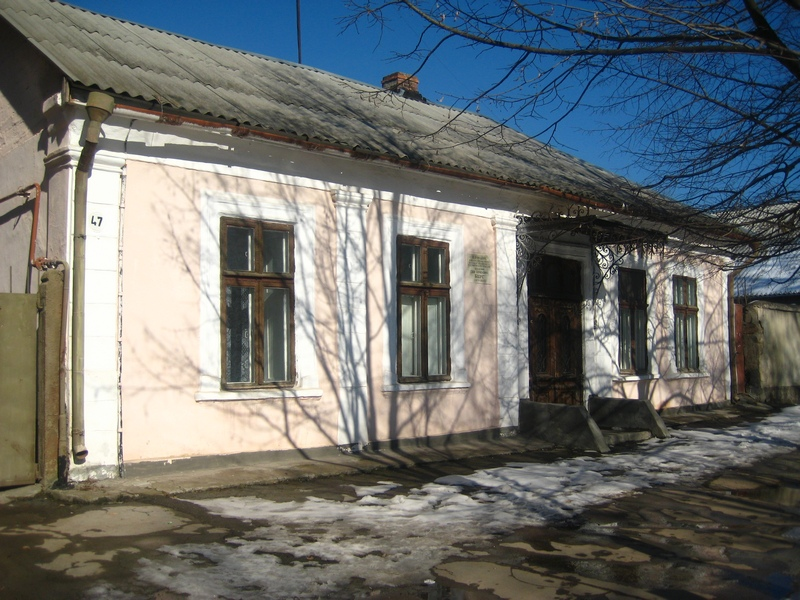 Дом Берга